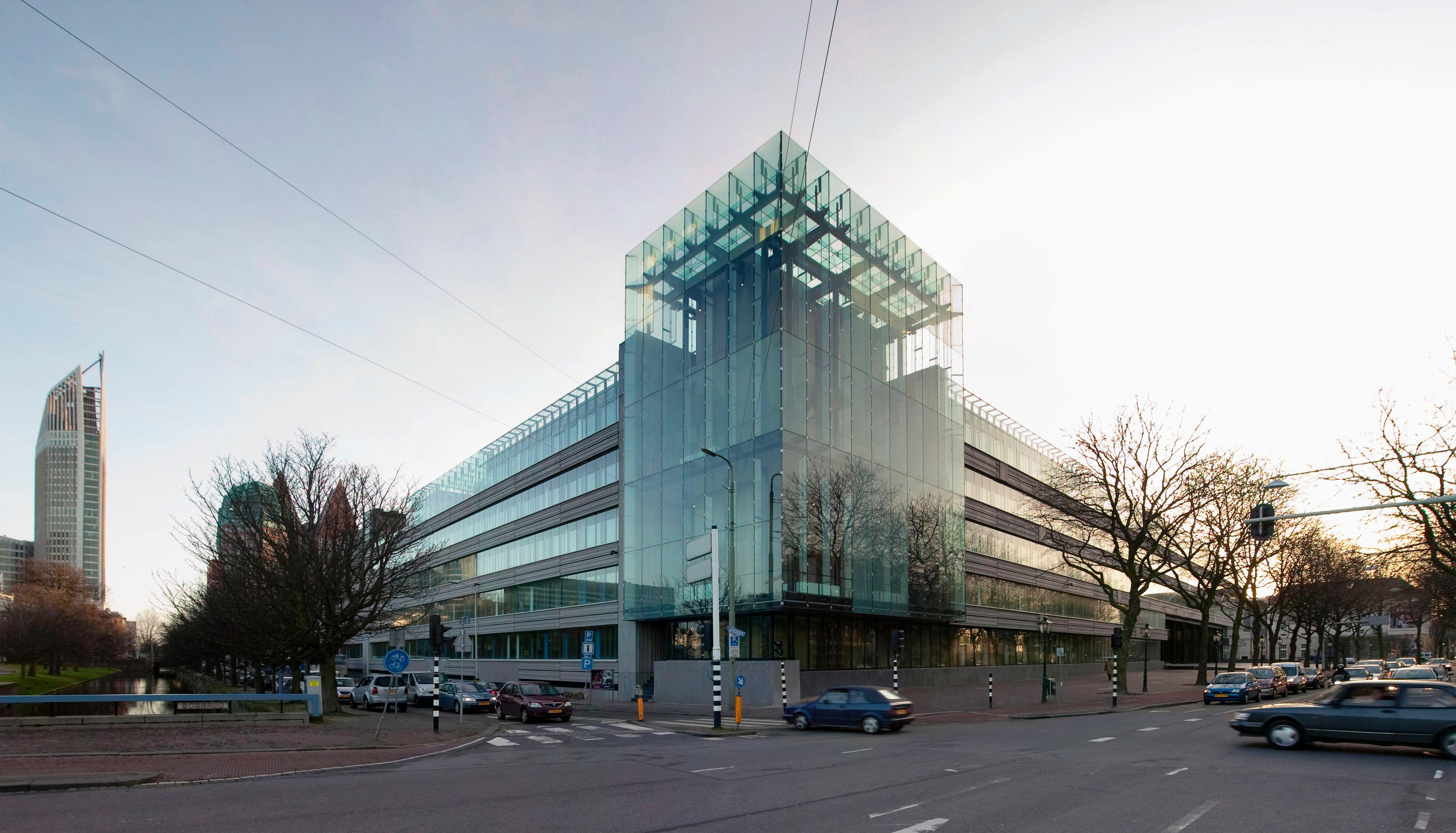 Wintertuin Ministerie van Financiën - na de renovatie.